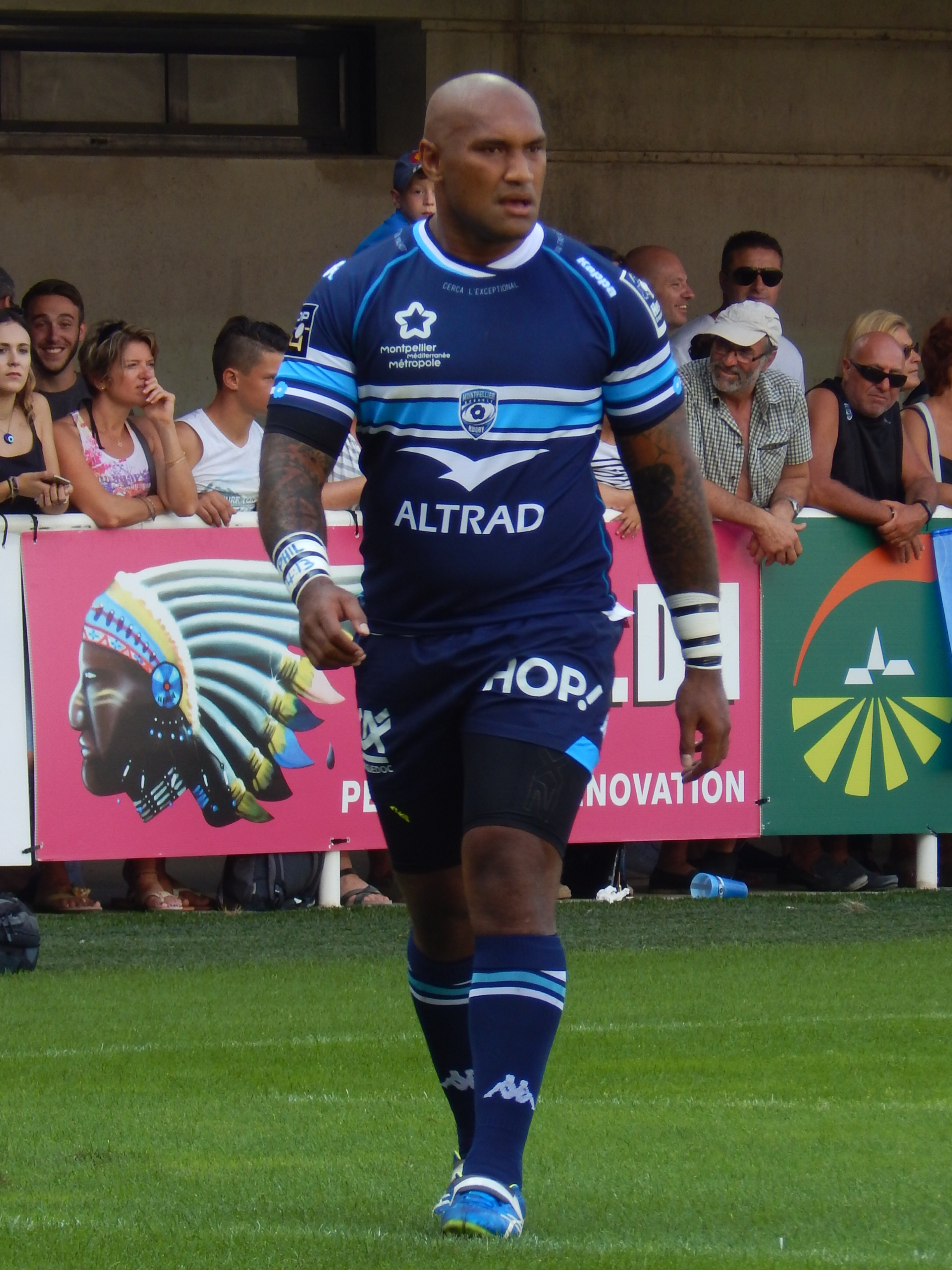 Nemani Nadolo, Montpellier, 2016.